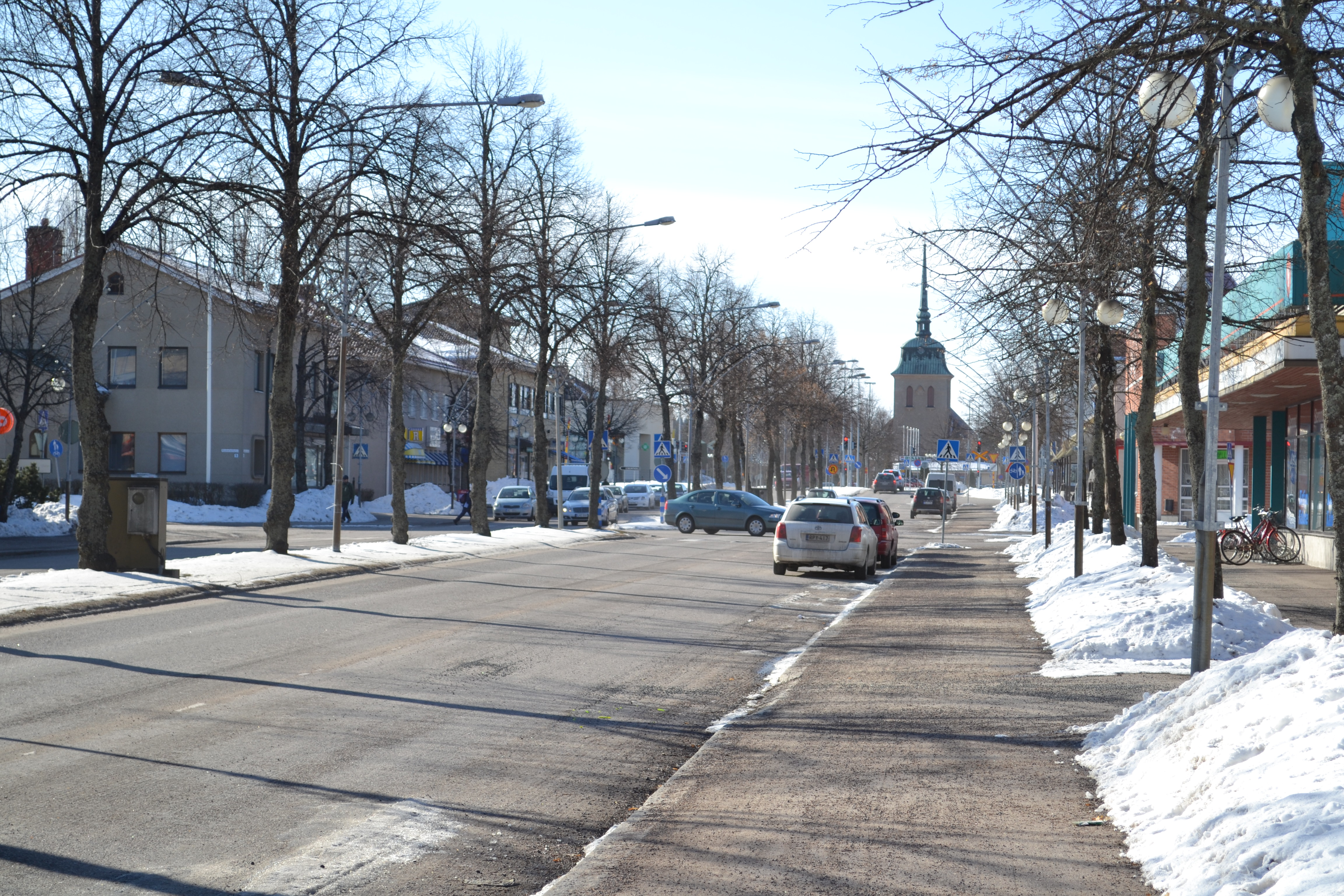 Mäntän keskustaa